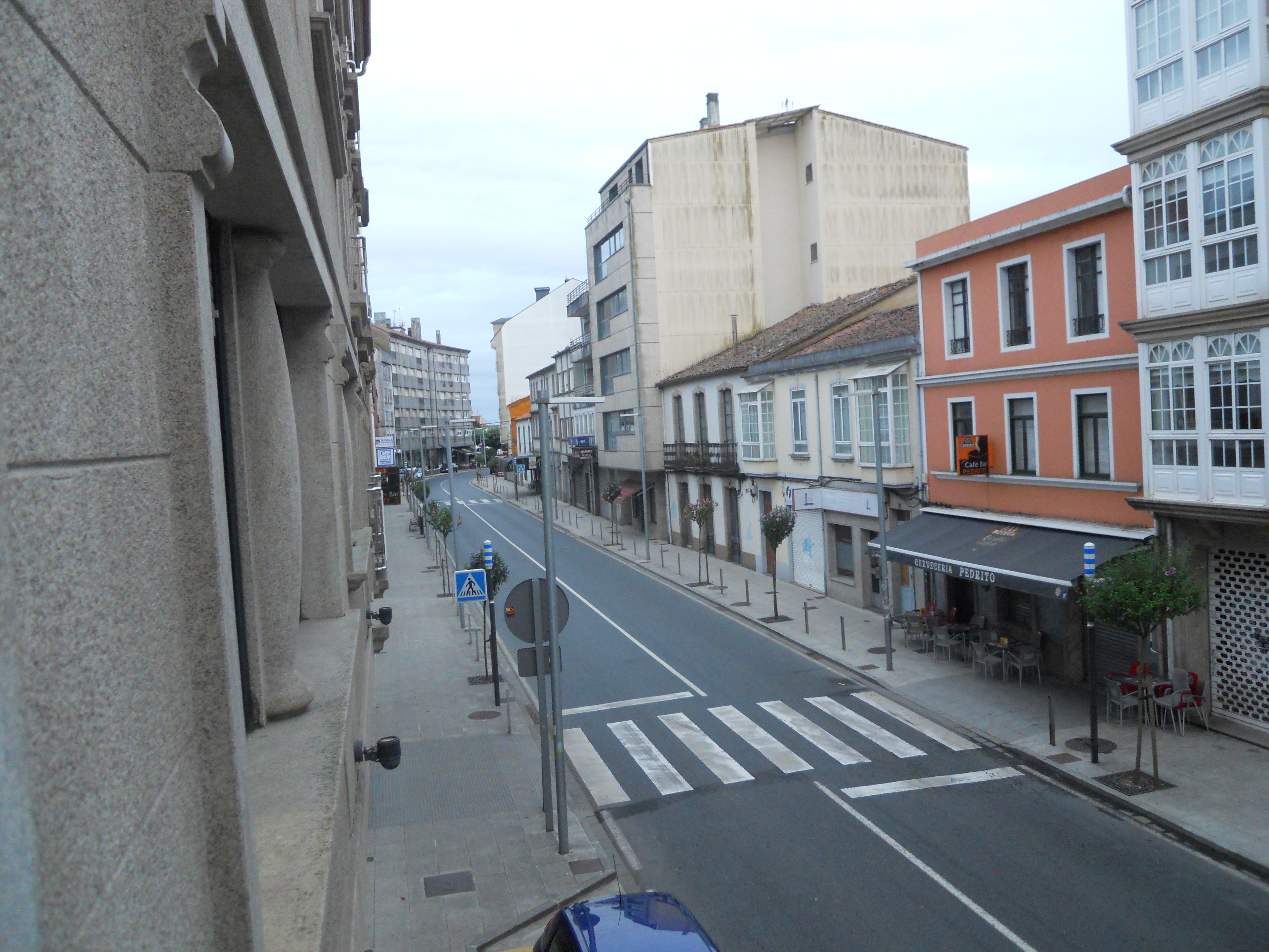 Strada principale di Arzùa